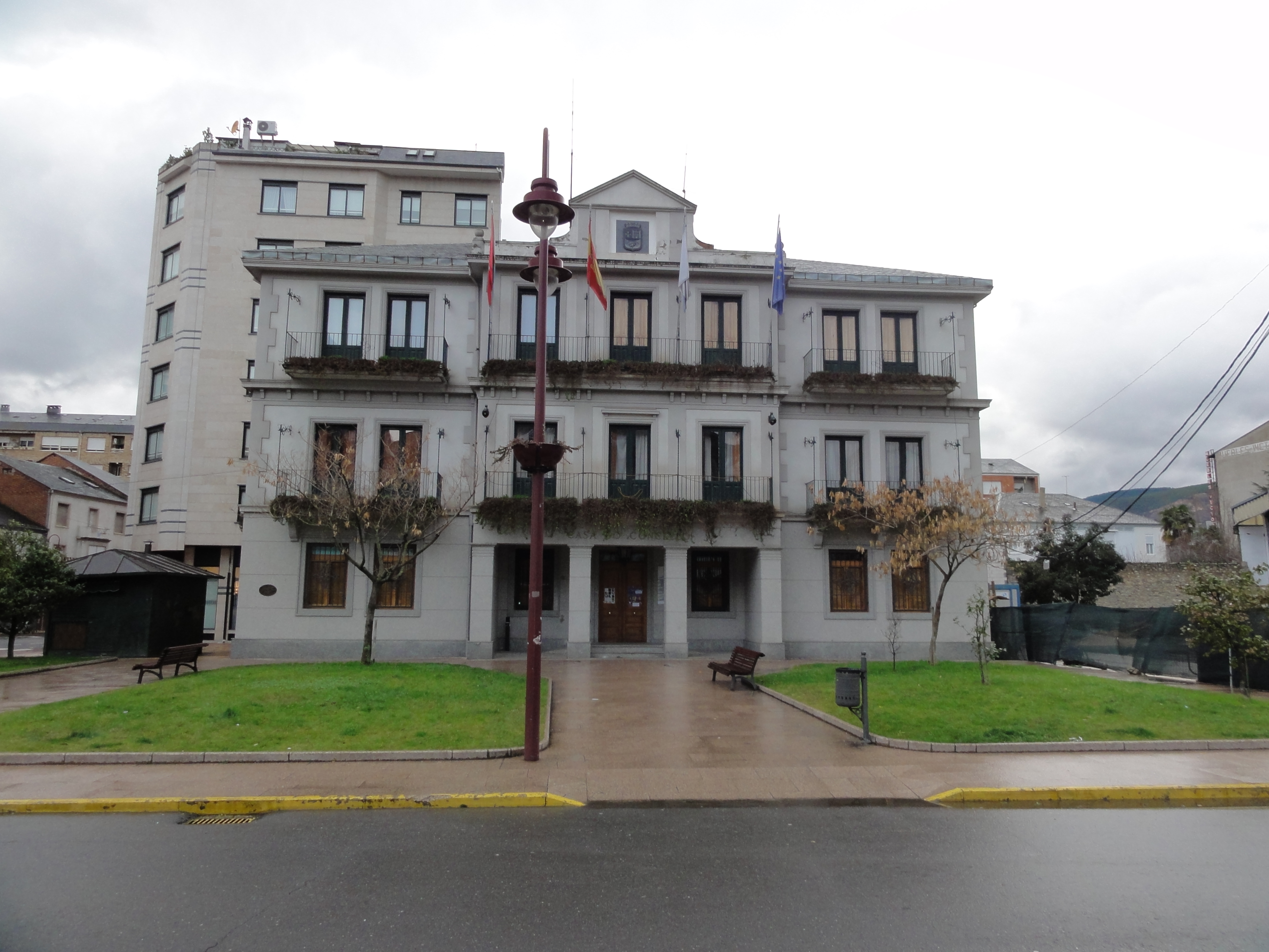 Antigo Ayuntamiento del Barco de Valdeorras